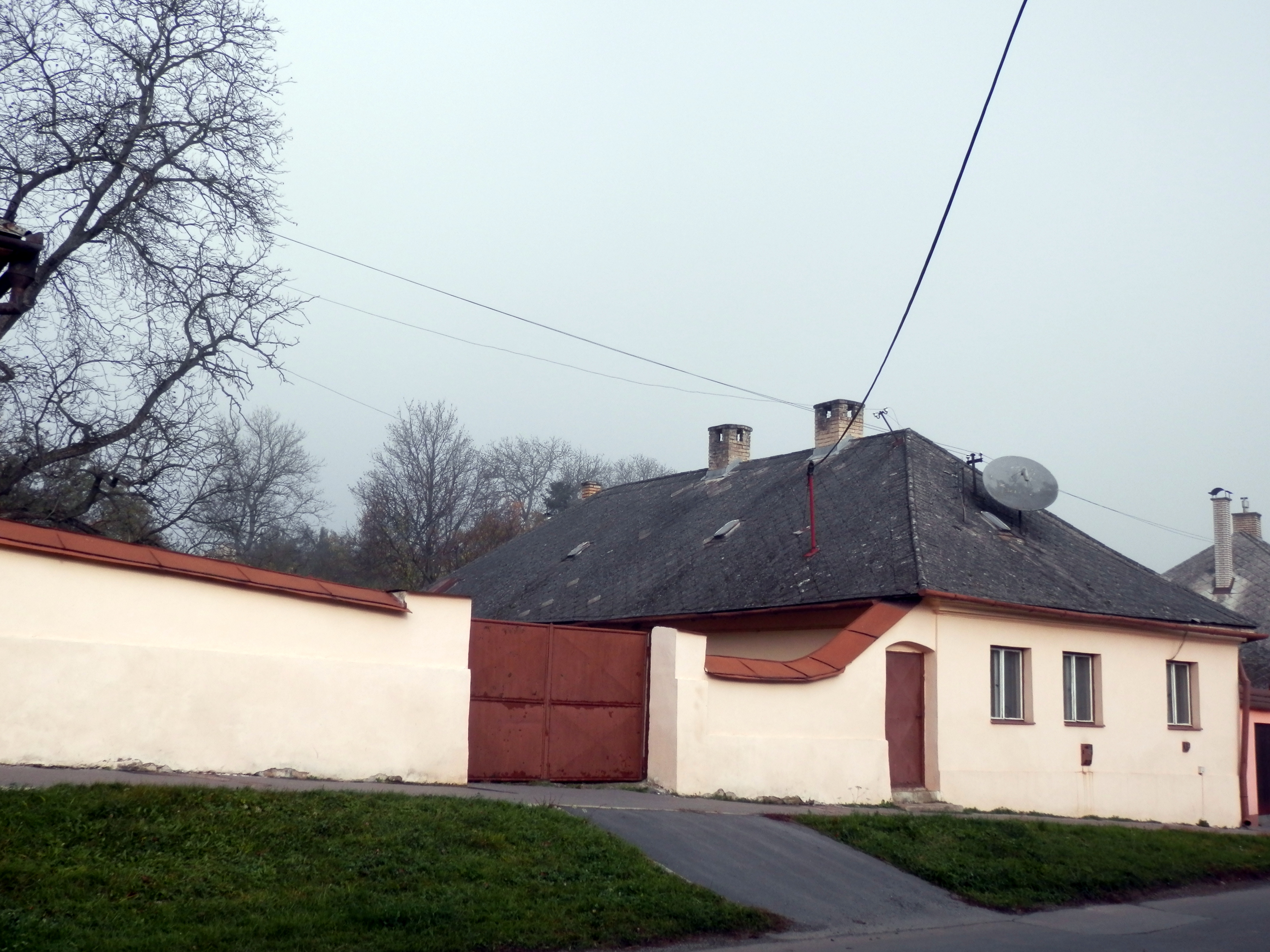 Ulica Soľnobanská 21. Mesto Prešov. Národná kultúrna pamiatka - meštiacky dom.